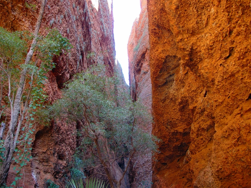 Bungle Bungles Echidna Chasm 190503